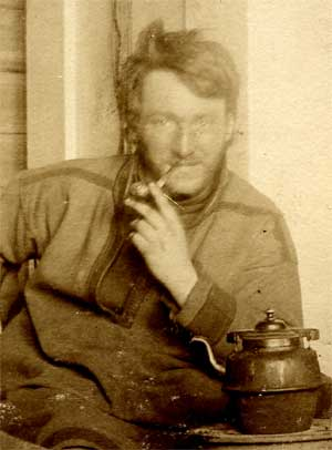 Корен, Юхан